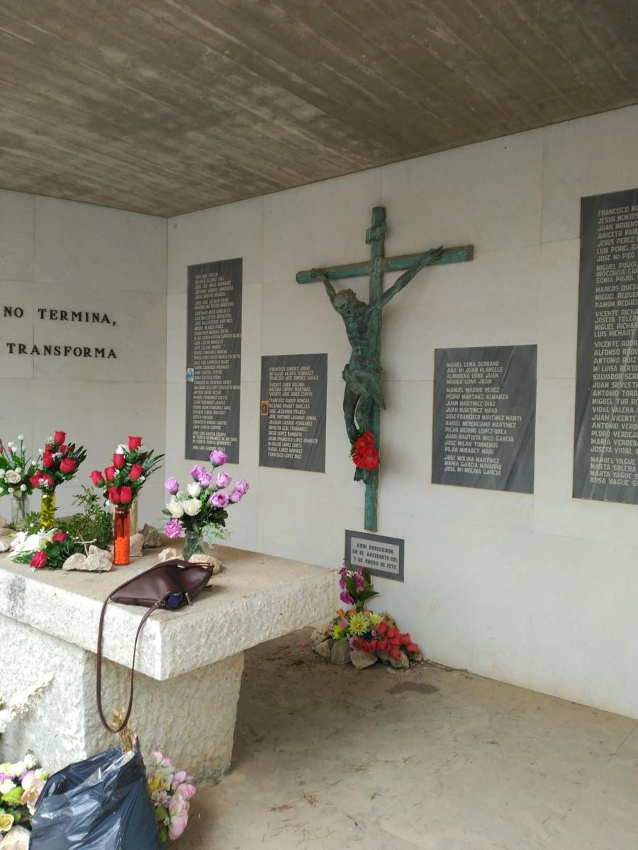 Memorial accidente aéreo 7 enero 1972